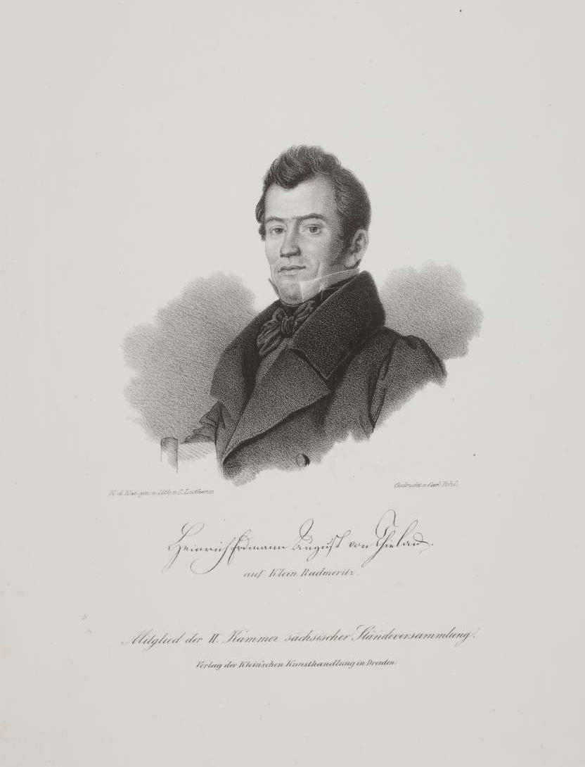 sächsischer Politiker und Reichstagsabgeordneter (1798-1877)